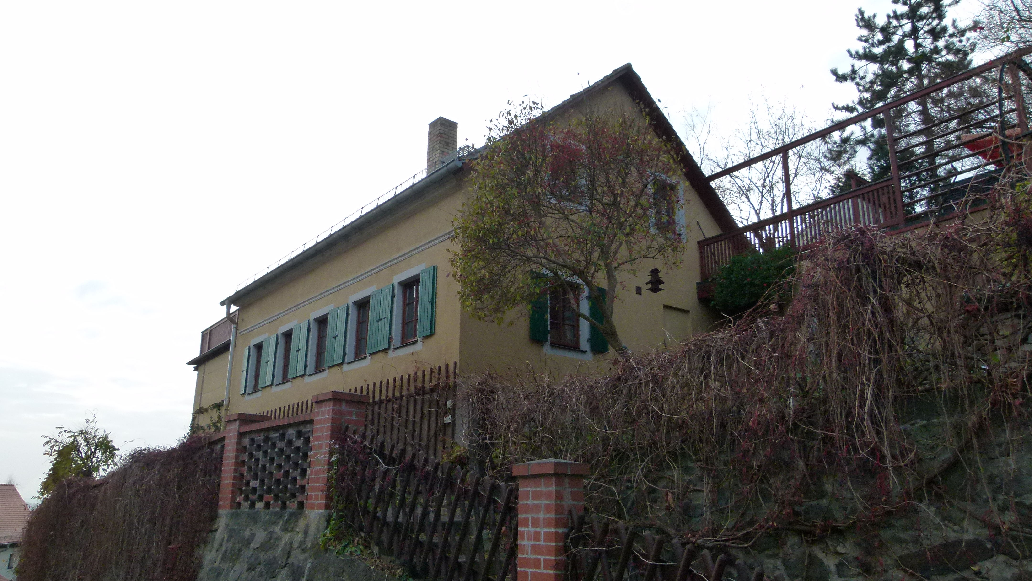 Denkmalgeschütztes Haus, Wachwitzgrund 7, Wachwitz, Dresden